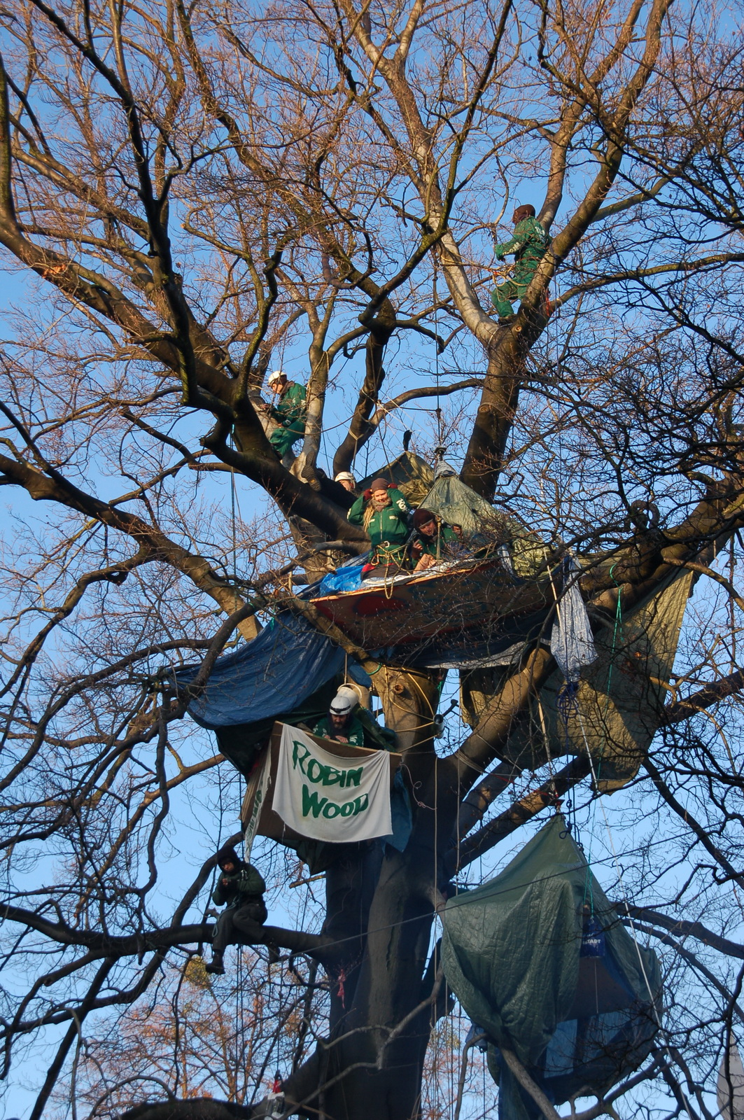 Die Plattformen in der besetzten Buche (Dresden 2007/2008)